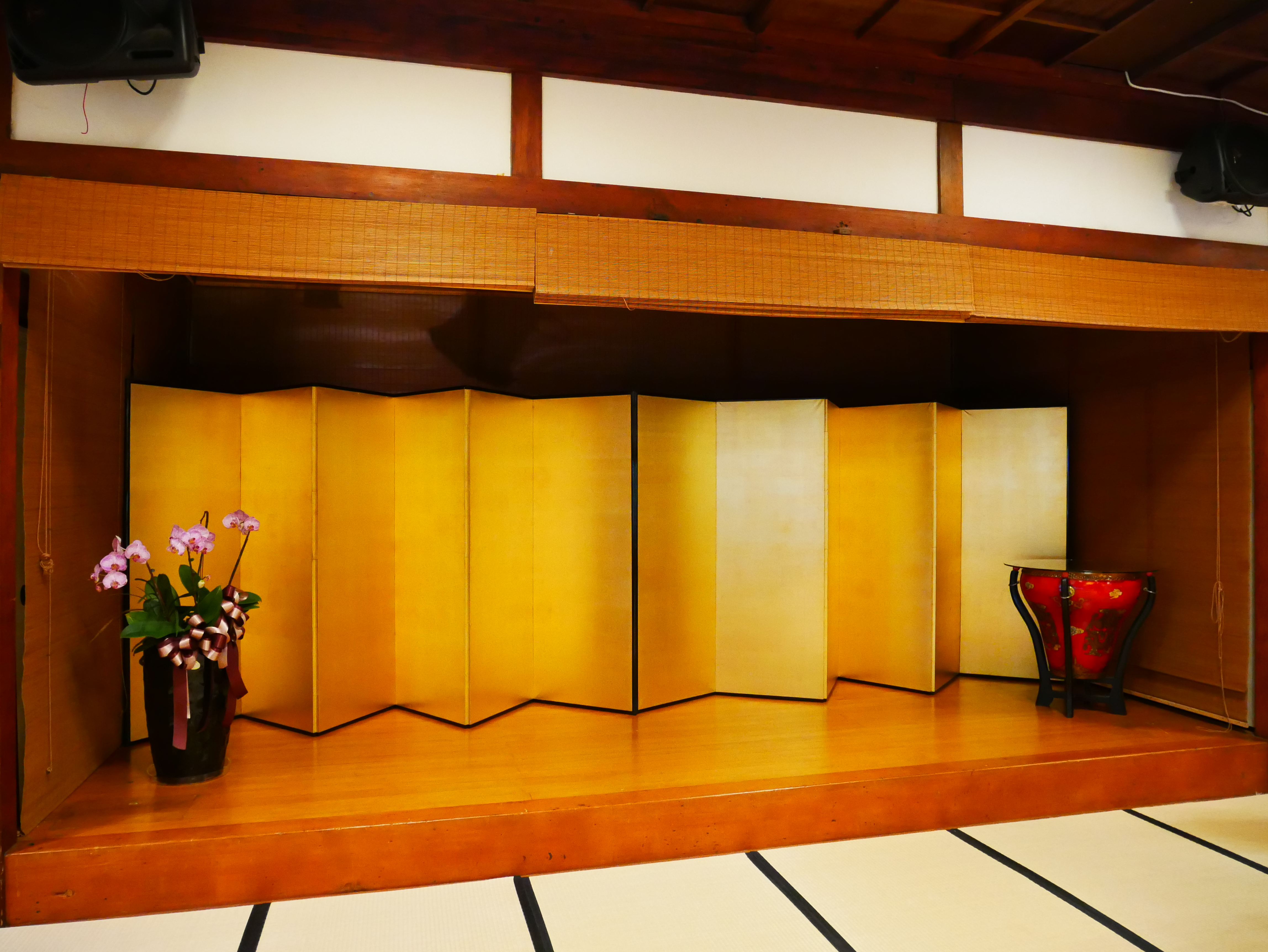 北投文物館大廣間舞台，臺北市北投區新北投次分區林泉里